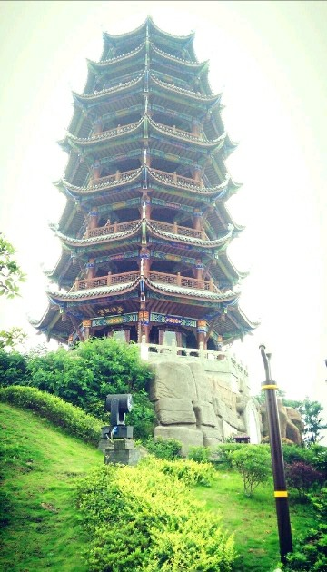 这是我自己拍摄的作品，长寿菩提寺达摩塔。